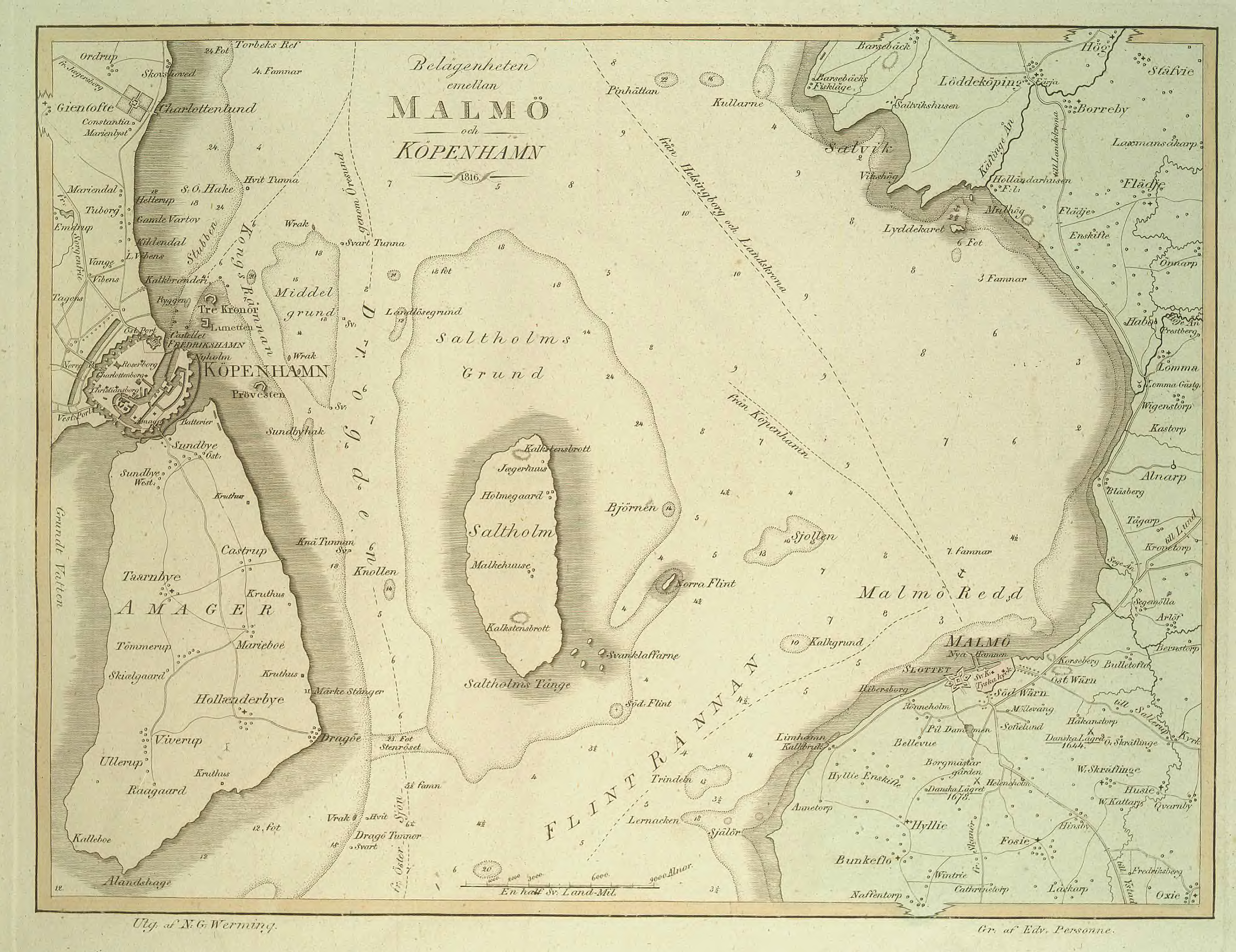 Karta över Malmö och Köpenhamn från 1816 av NG Werming.